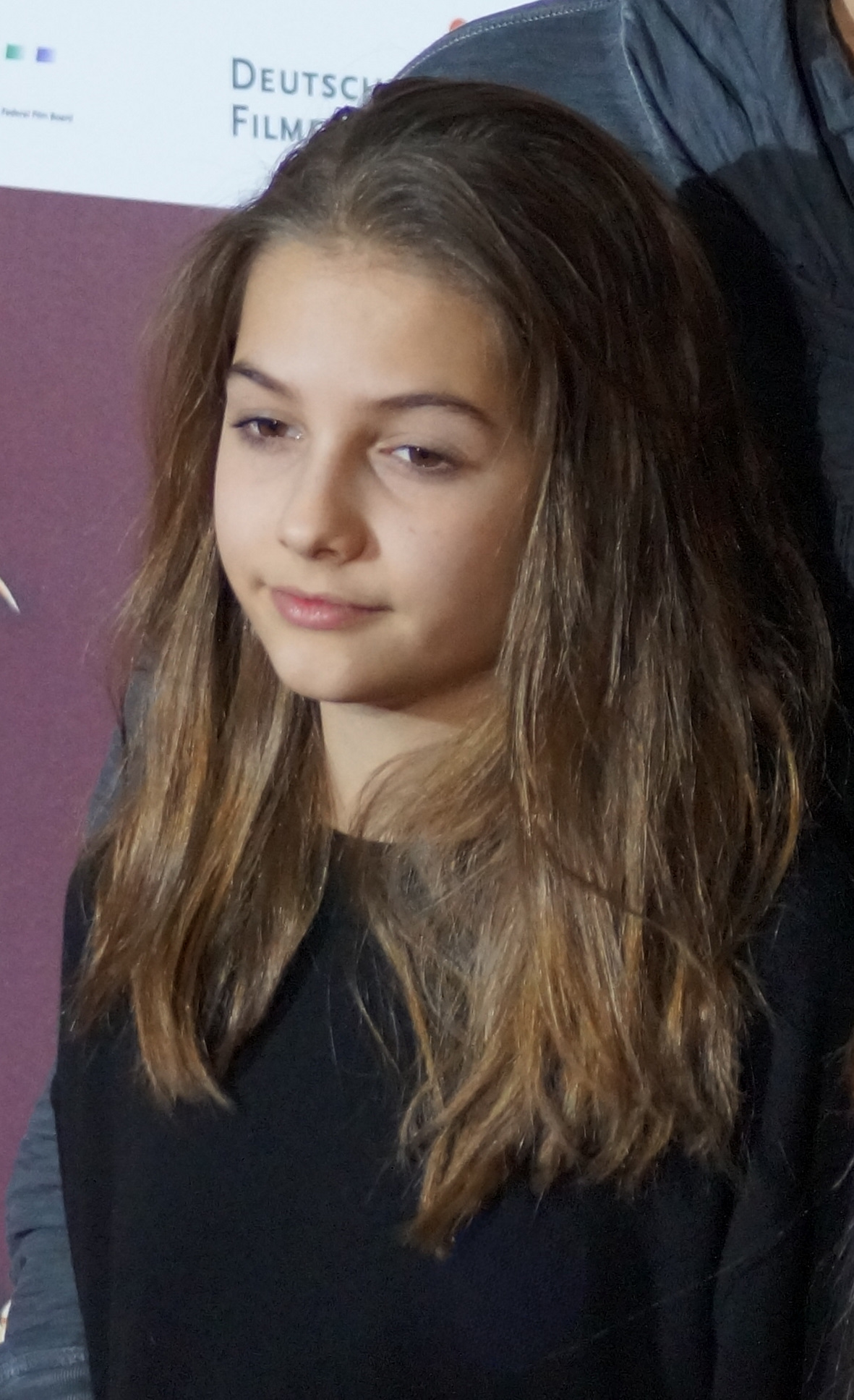 Jan Josef Liefers mit seiner Frau Anna Loos und ihren Kindern Lilly und Lola bei der Deutschlandpremiere von "Mara und der Feuerbringer", am 29. März 2015, im Cinedom Köln